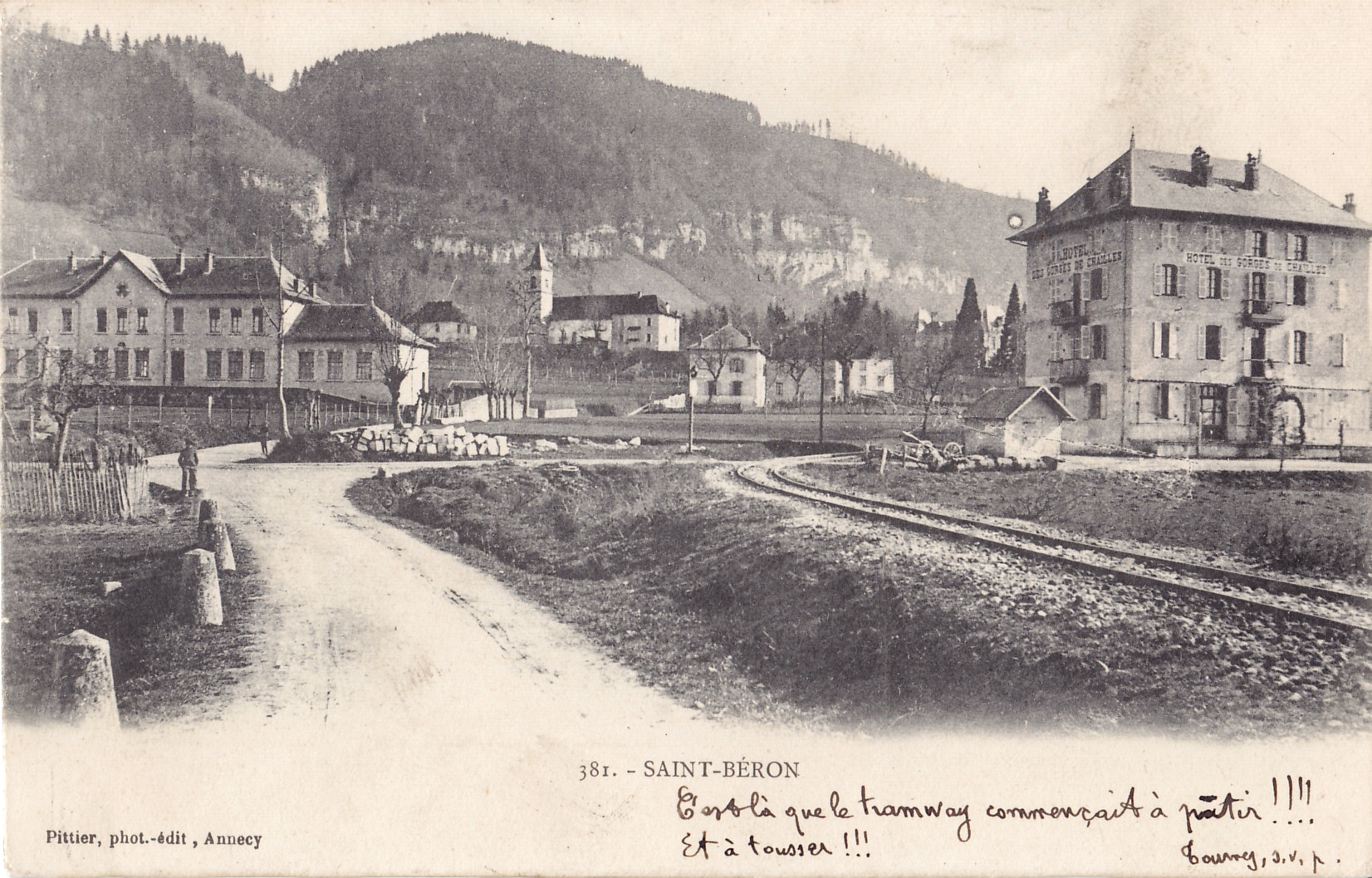 Carte postale ancienne éditée par Pittier à Annecy, n°381 :SAINT-BERON